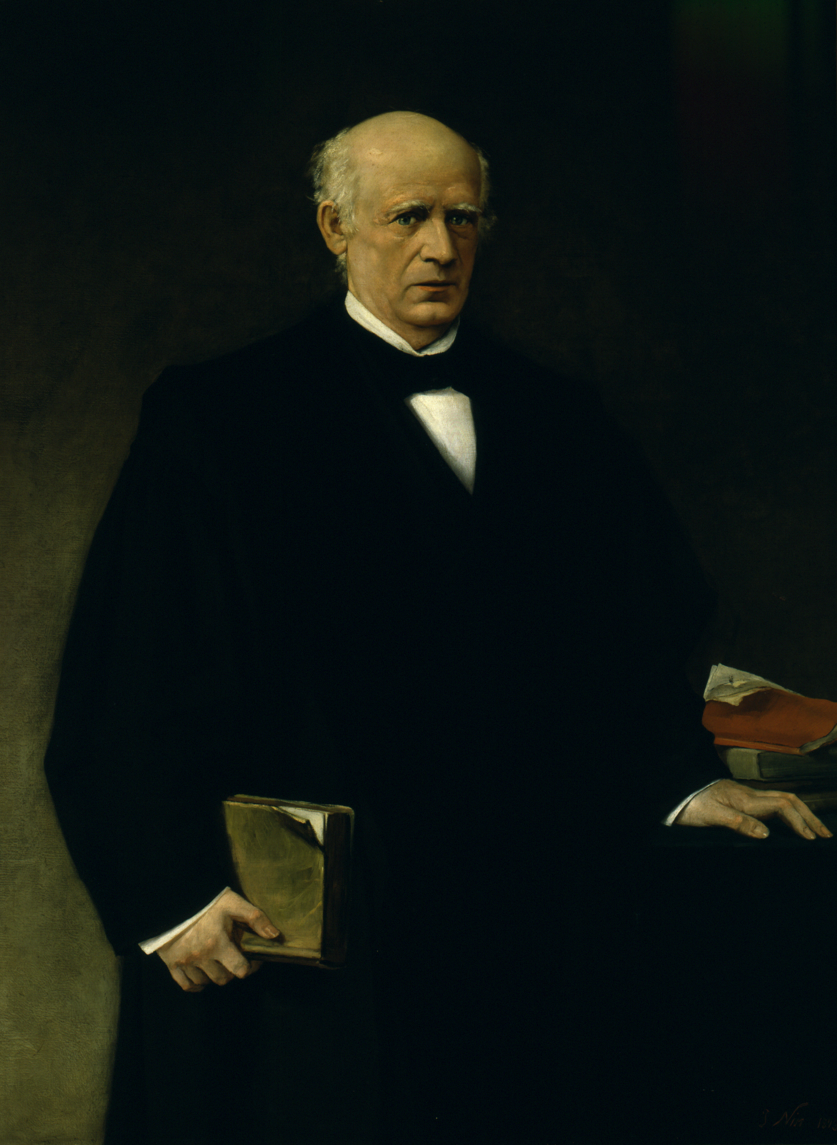 Pascual Madoz.